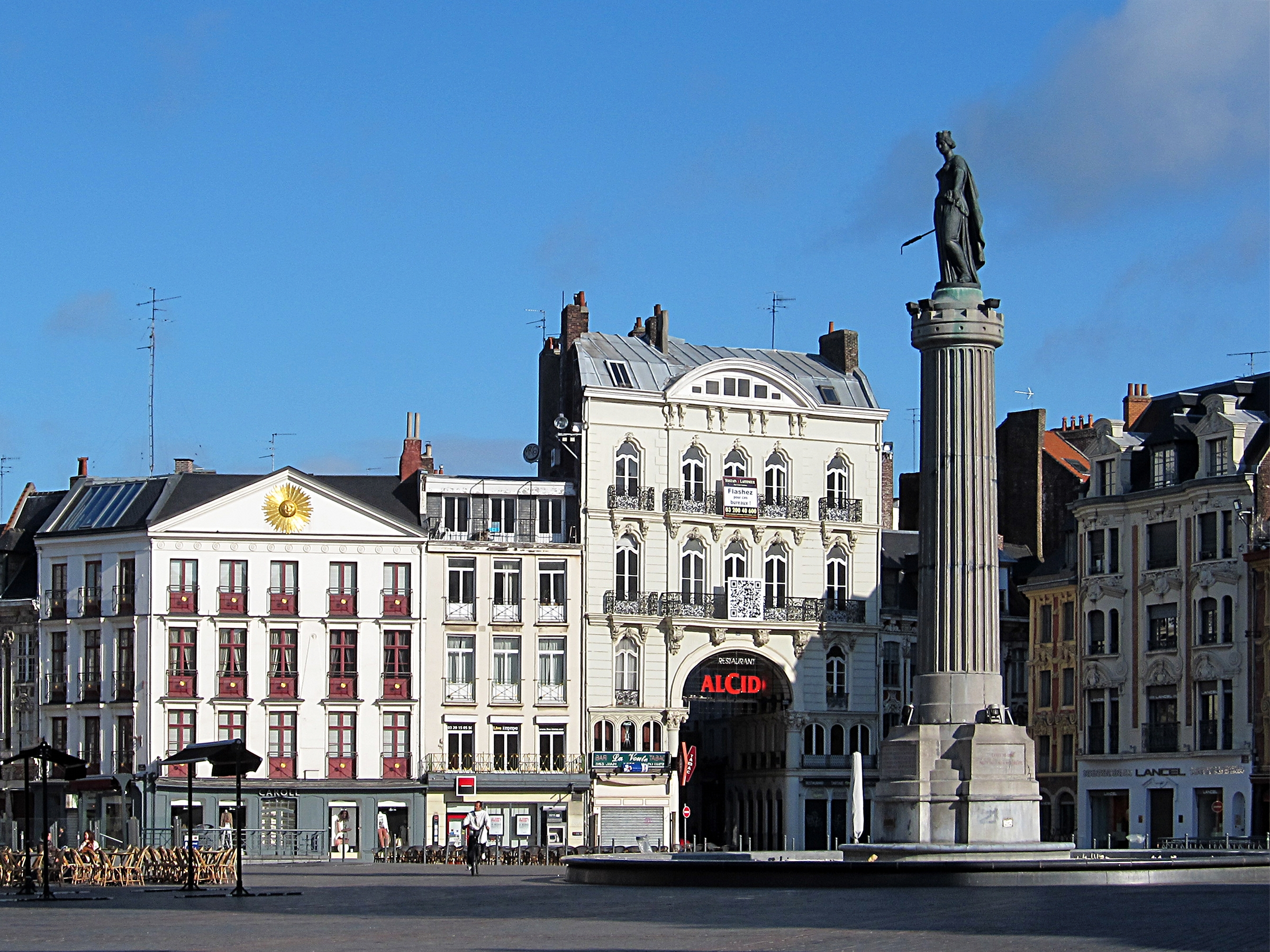 La colonne de la déesse sur la grand place de Lille.